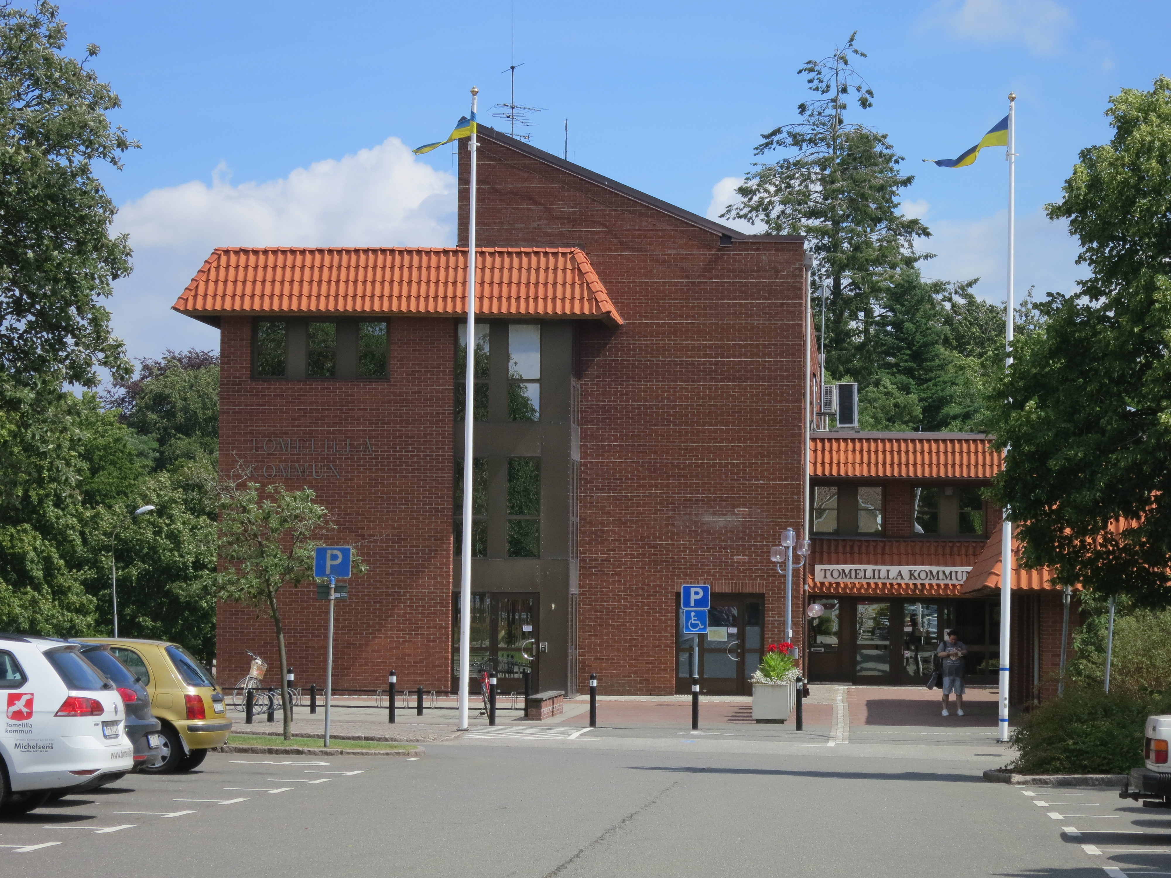 Tomelilla kommunhus 2016